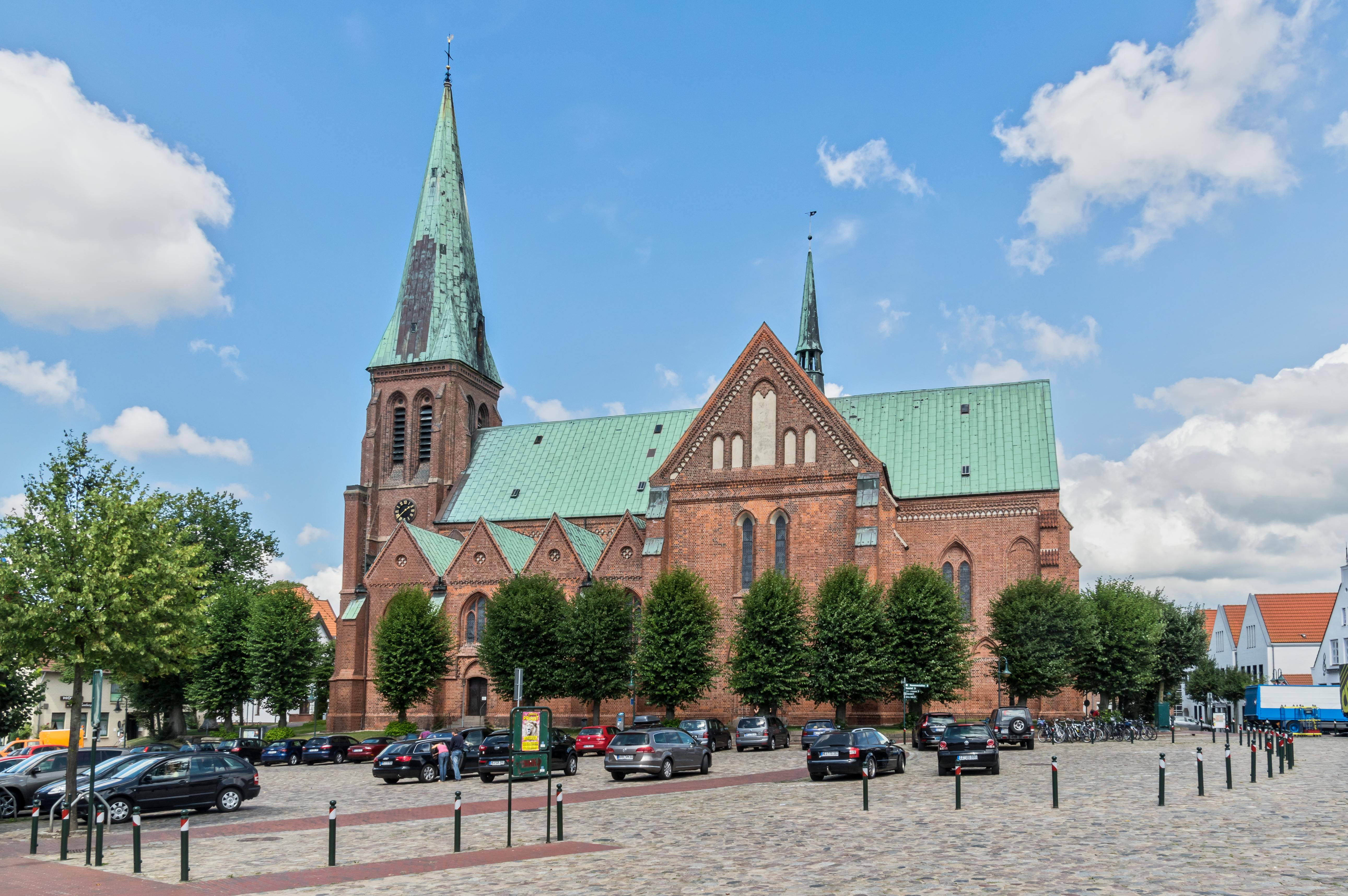 Bilder aus Meldorf Die Sankt Johannis Kirche in Meldorf auch Meldorfer Dom genannt